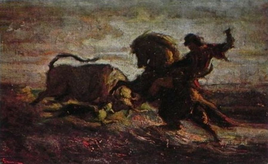 Dragos si zimbrul (varianta - 1863 - 1864) - de Nicolae Grigorescu, Muzeul Național de Artă al României